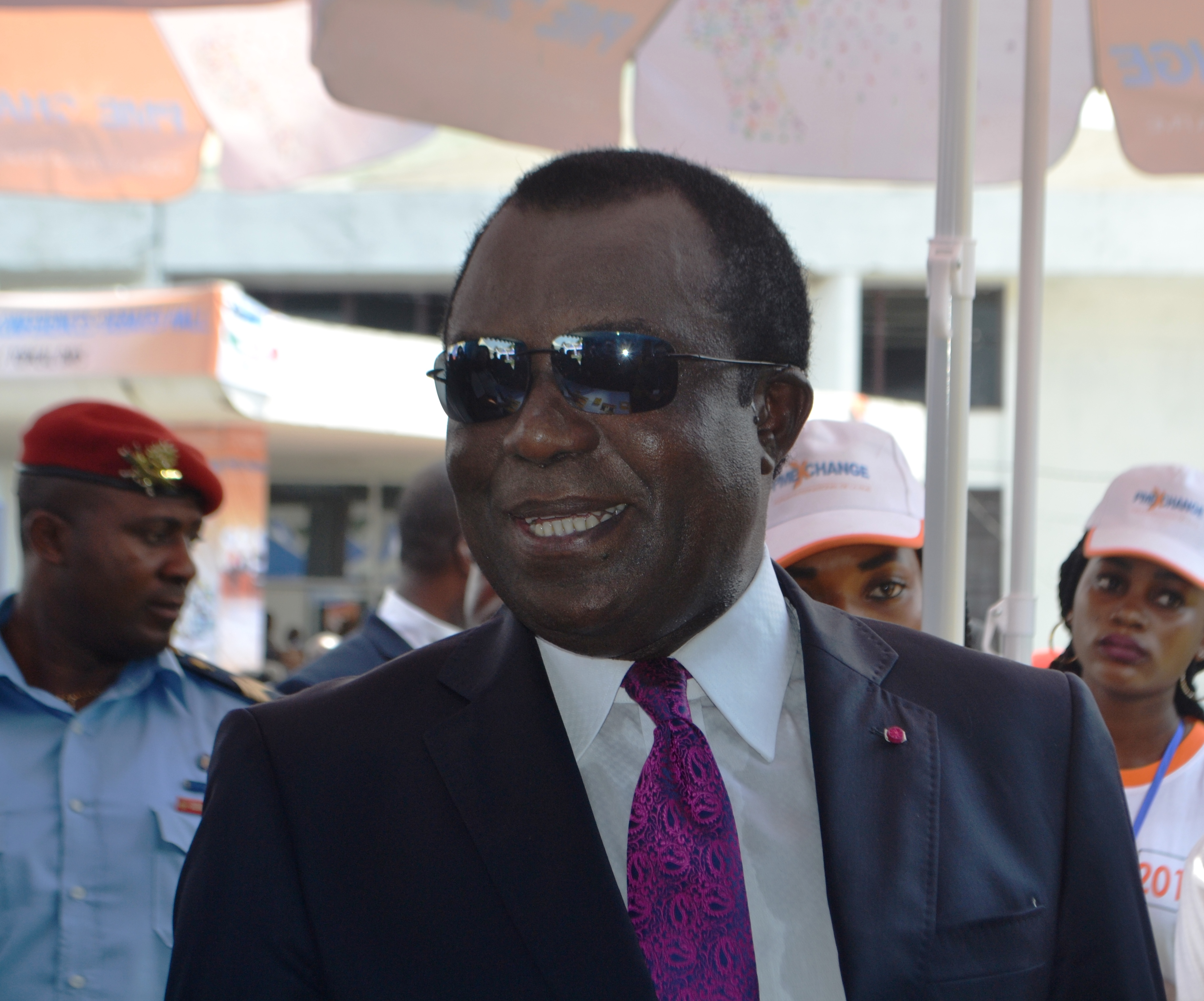 Ministre camerounais des petites et moyennes entreprises en 2017